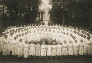 Internatsschülerinnen Bloemendal